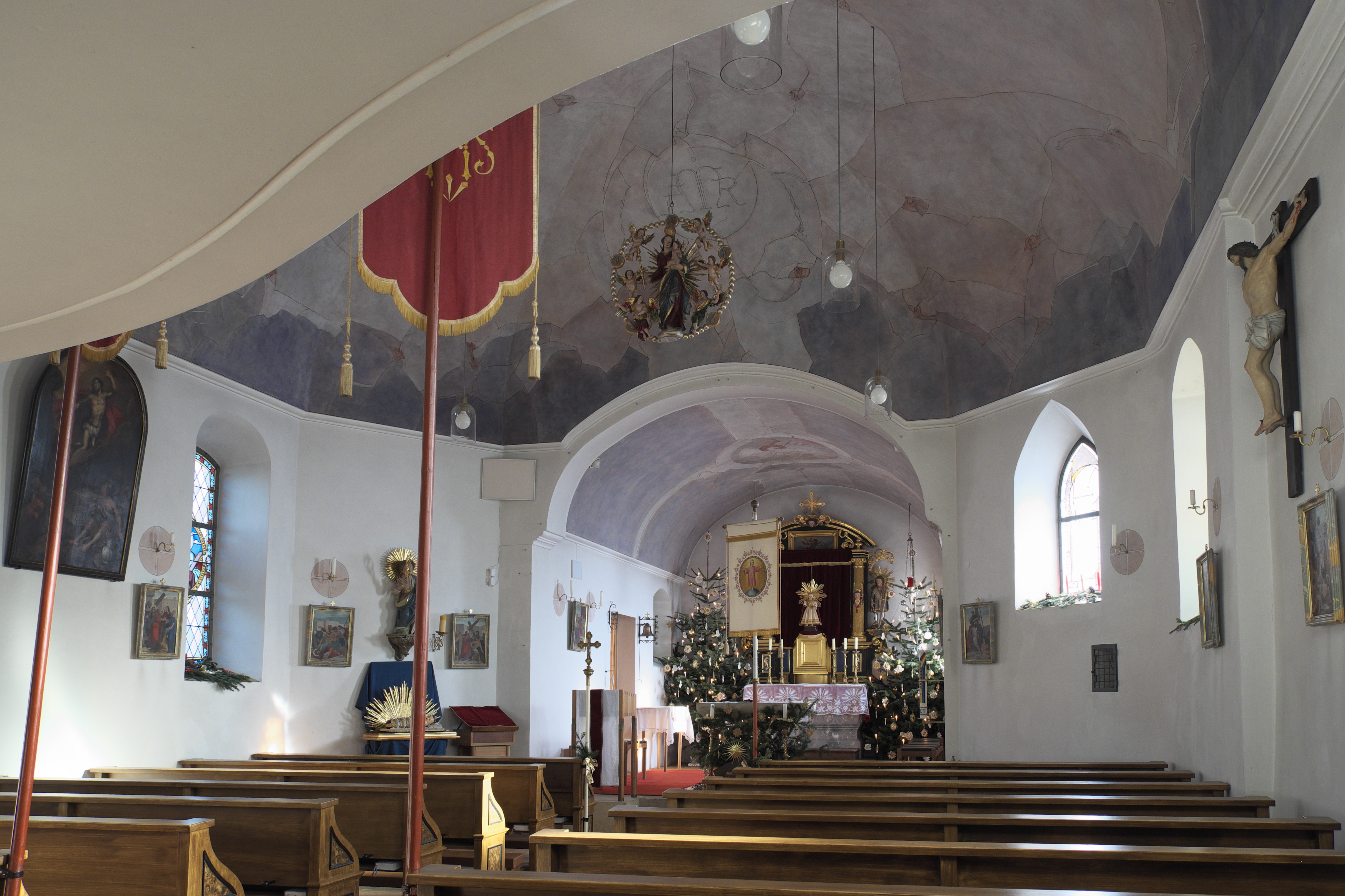 St. Pankratius in Mitterfischen (Pähl) im Landkreis Weilheim-Schongau (Bayern/Deutschland), Innenraum